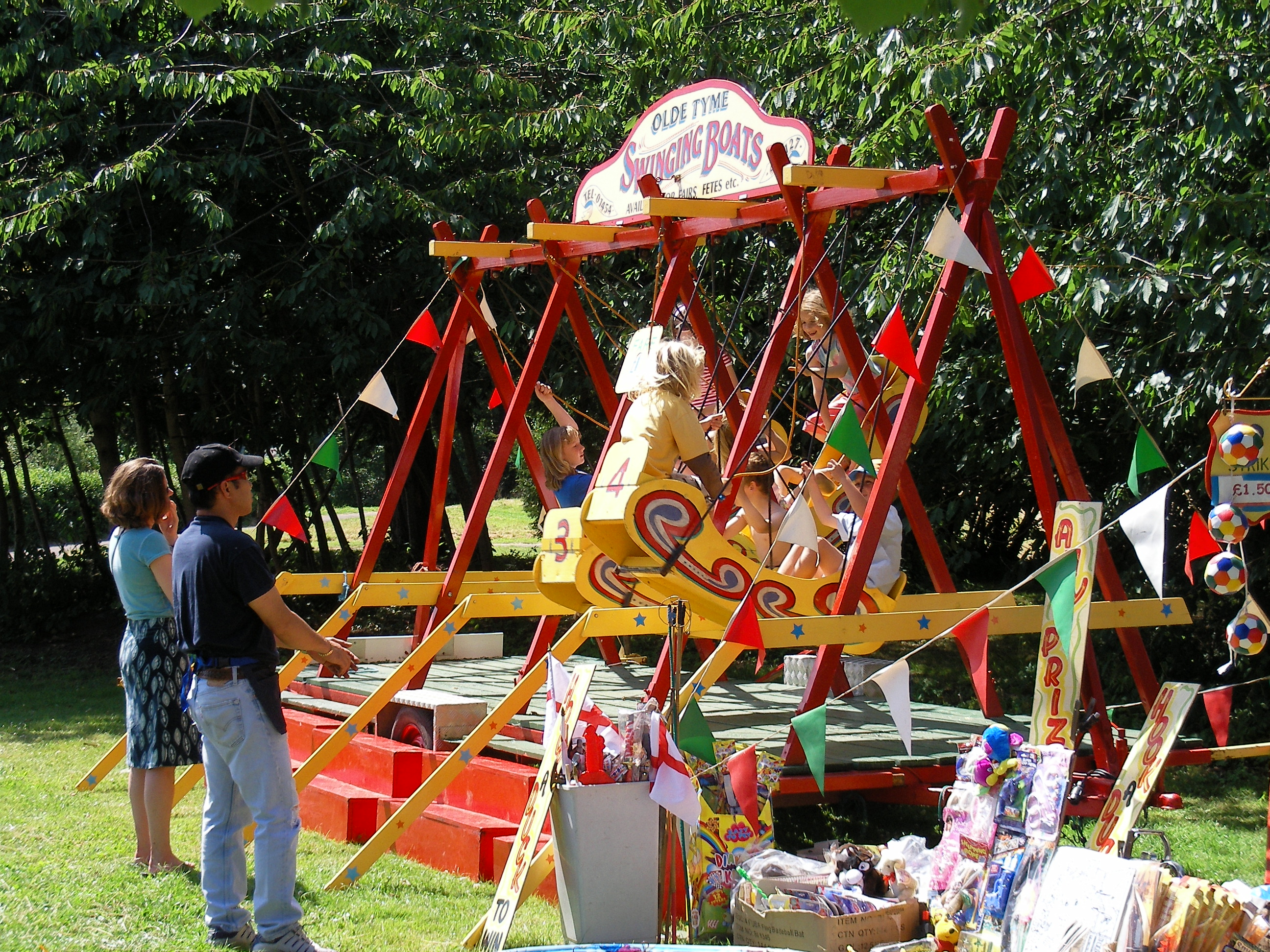 Summer Fayre, Stapleton Village Green